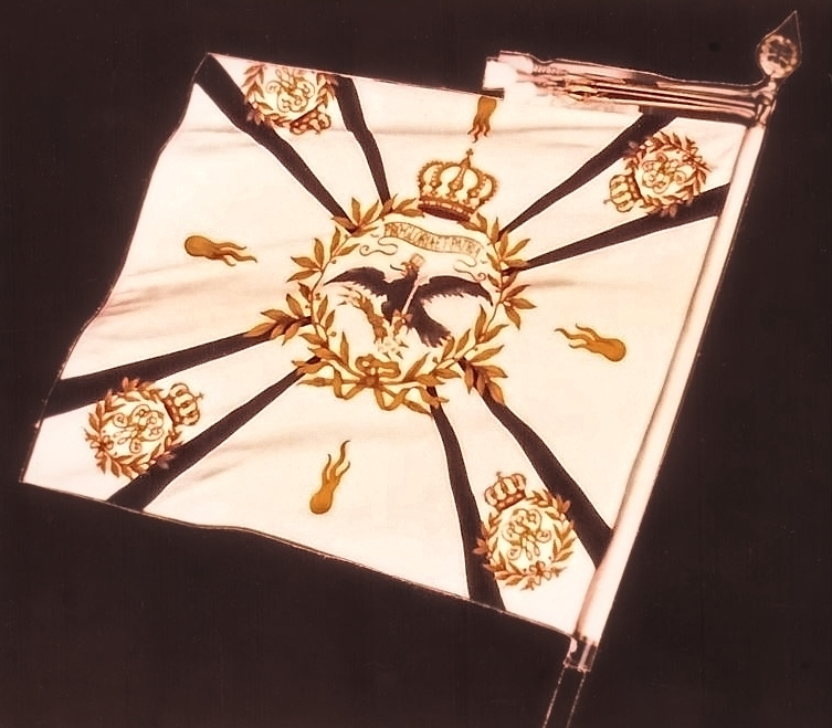 I. Bataillon Fahne, Regiment von Boyen